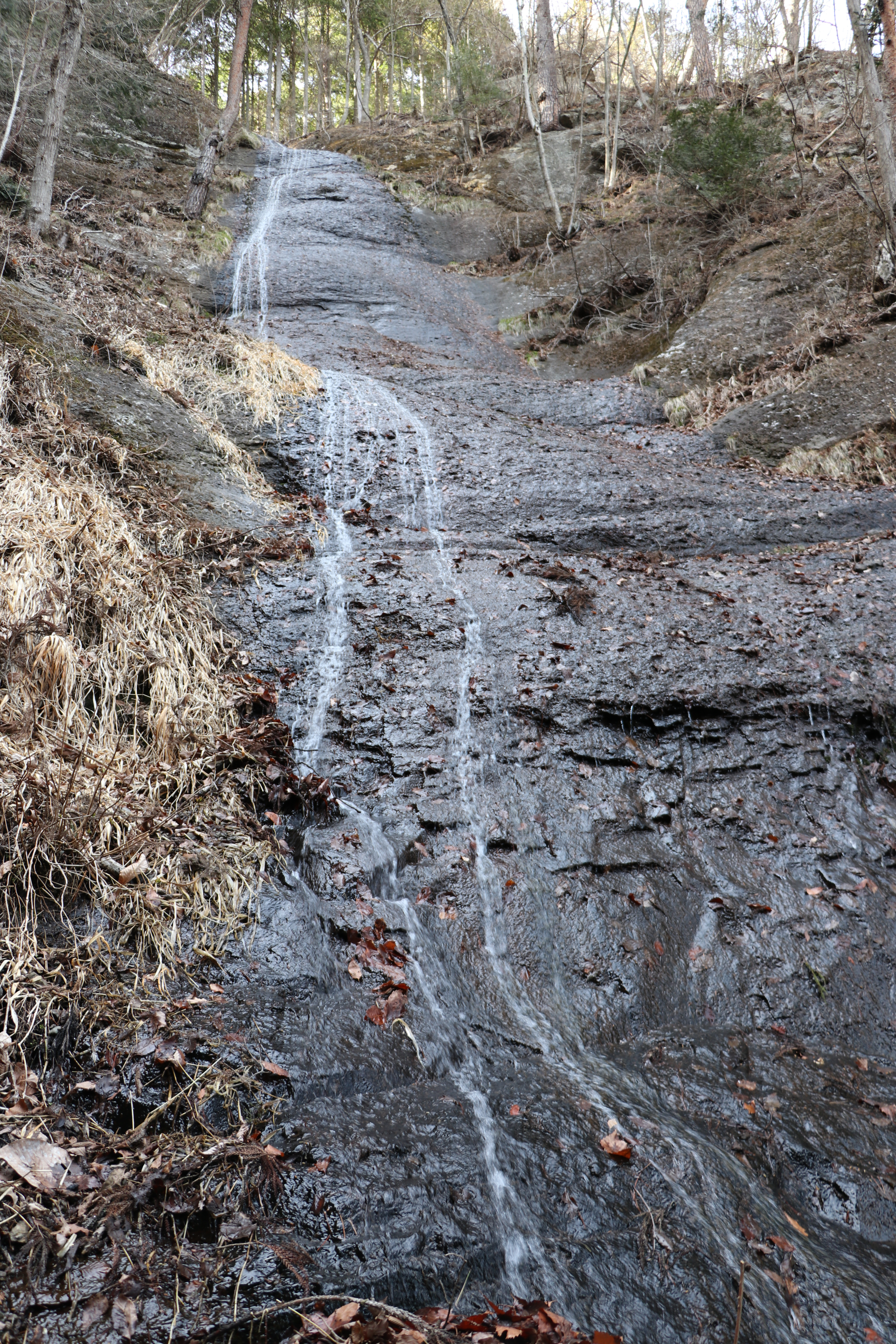 横バージョン: File:Shiraitonotaki Waterfall in Fujiyoshida Yamanashi.jpg